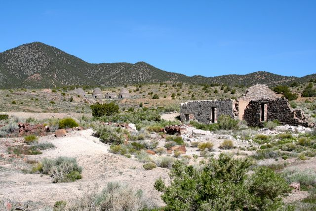 Downtown Frisco (UT)